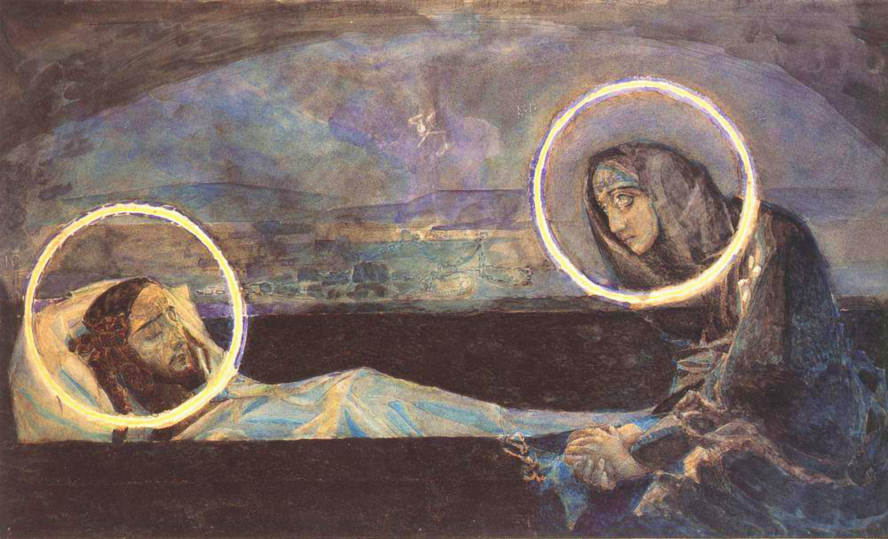 Надгробный плач. Акварельный эскиз композиции для Владимирского собора в Киеве